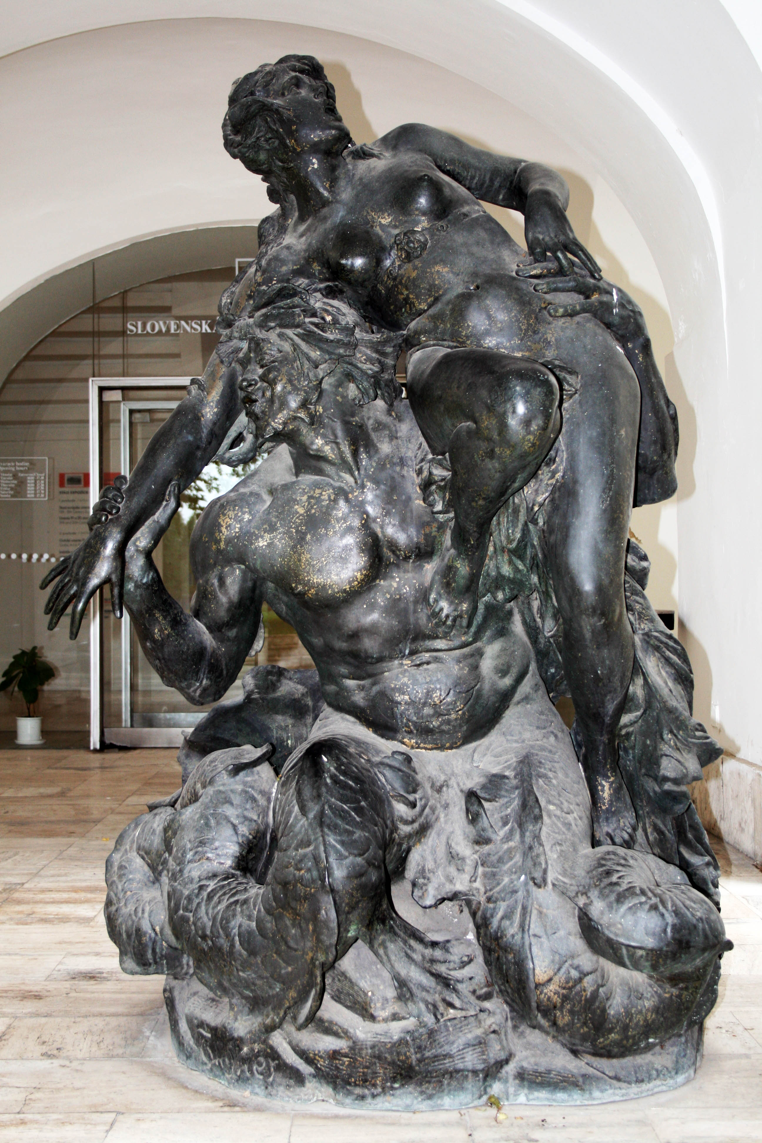 Bronzová plastika "Triton a nymfa" v objekte národnej galérie